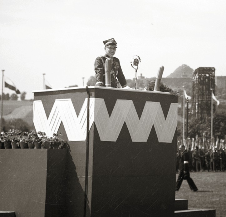 Przemówienie Edwarda Rydza-Śmigłego w Krakowie, 6 sierpnia 1939 r.